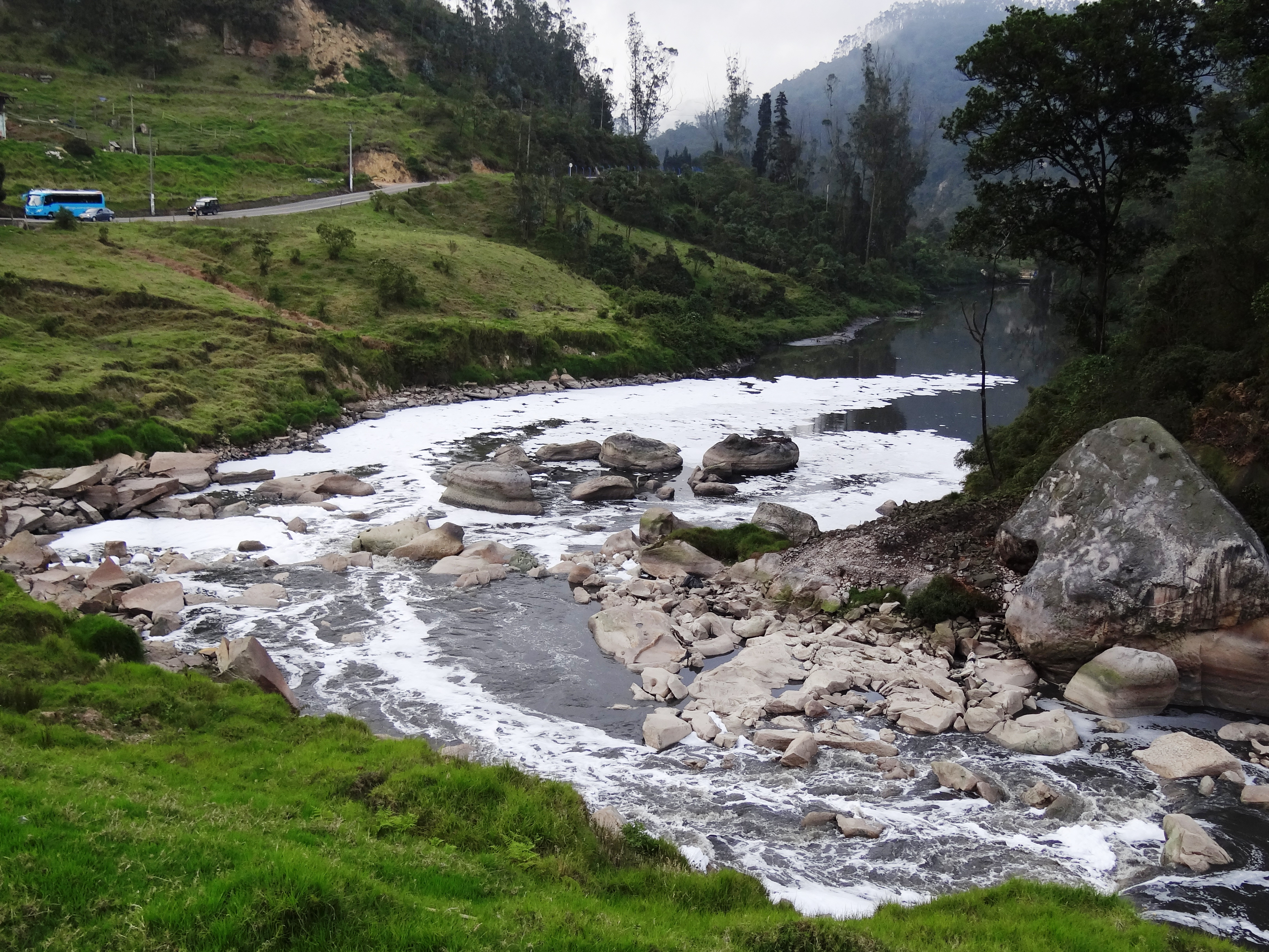 Río Bogotá en inmediaciones al Salto del Tequendama, Cundinamarca, Colombia.